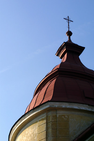 Detail věže kostele sv. Mikuláše v Kozojedech, postaveného podle projektu architekta J. B. Santini-Aichela.